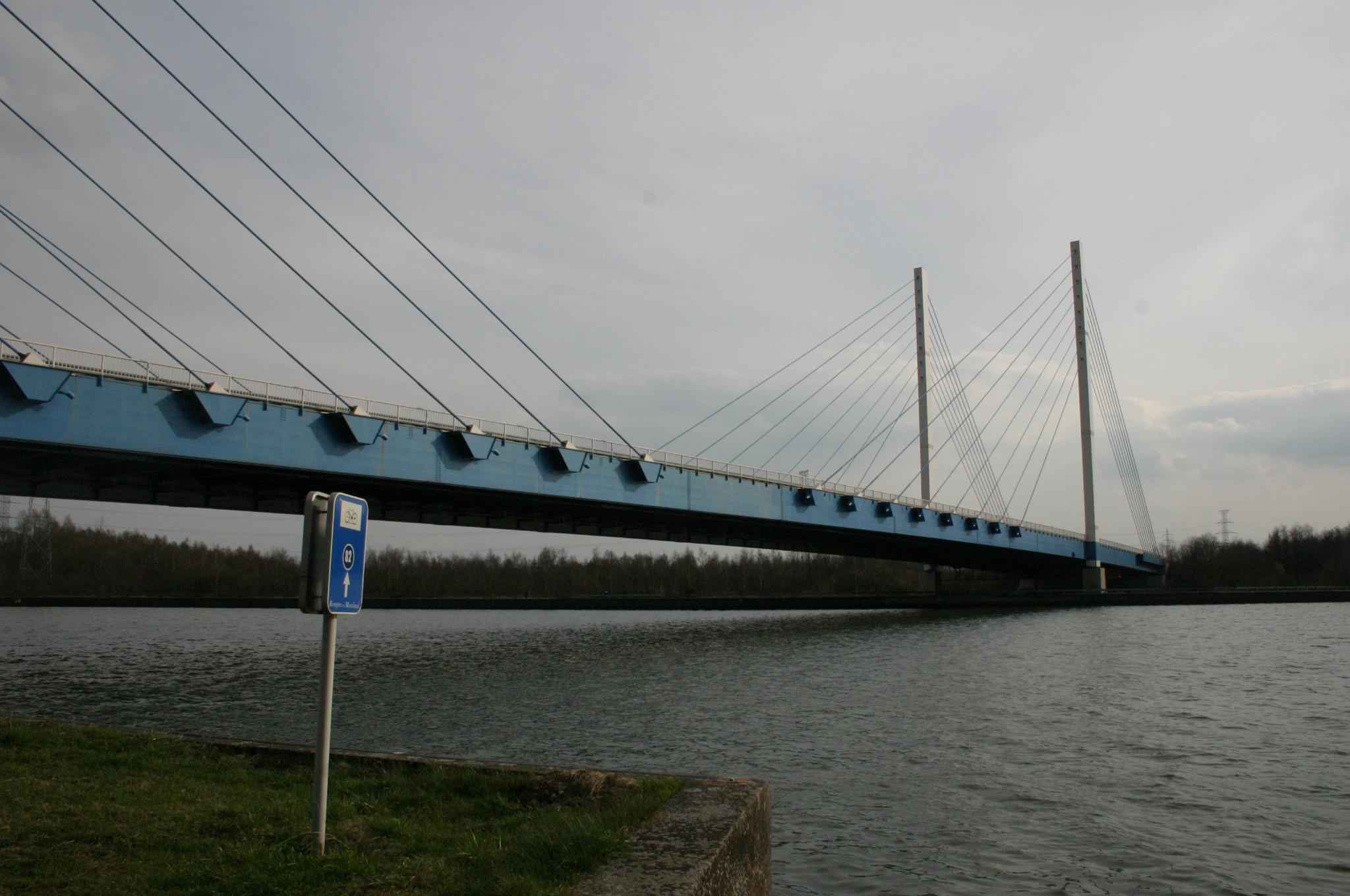 Pont de Godsheide